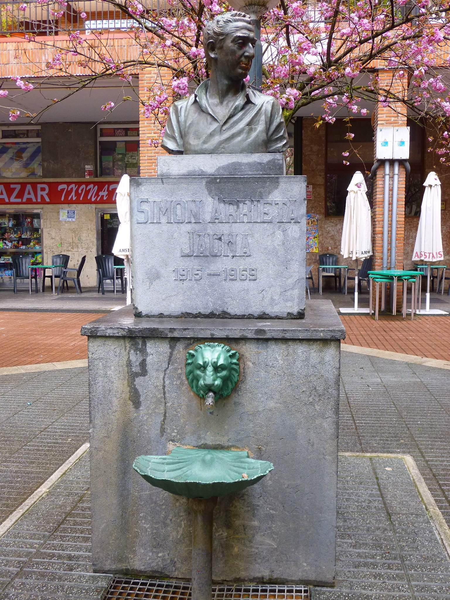 Bergara - fuenteEuskara: Bergara - Iturria eta gainean, Simon Arrieta pintorearen bustoa, Lorenzo Askasibarrek egina.